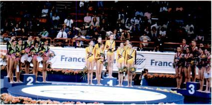 El conjunto español (izqda.) junto al ruso (centro) y el búlgaro en el podio del concurso general del Mundial de París en 1994.